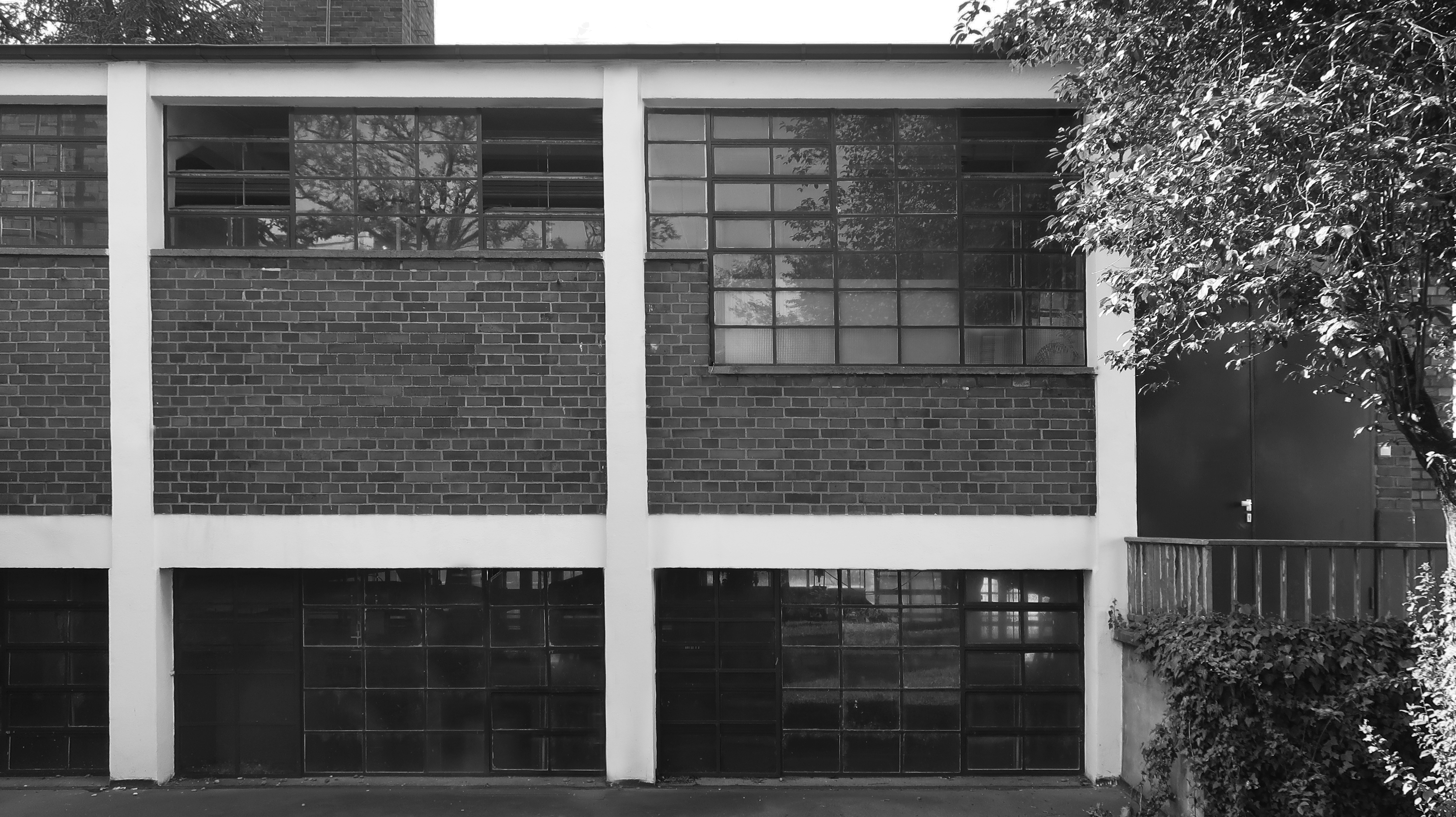 Heizwerk im Bauabschnitt 1 in der Hellerhofsiedlung von Mart Stam .